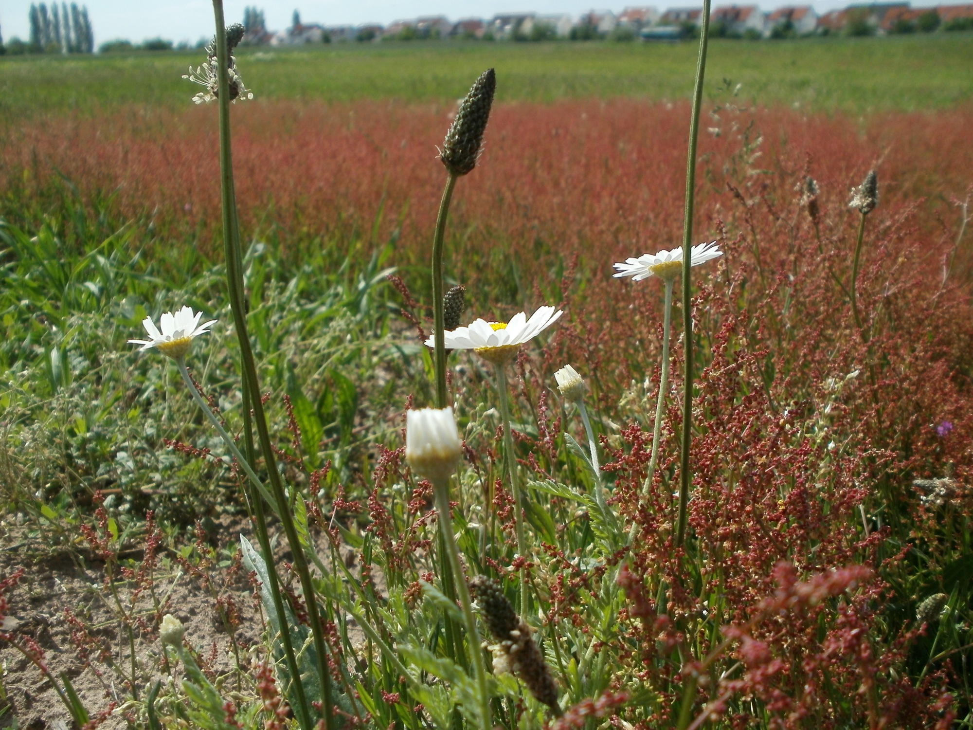 Wiese bei Hockenheim